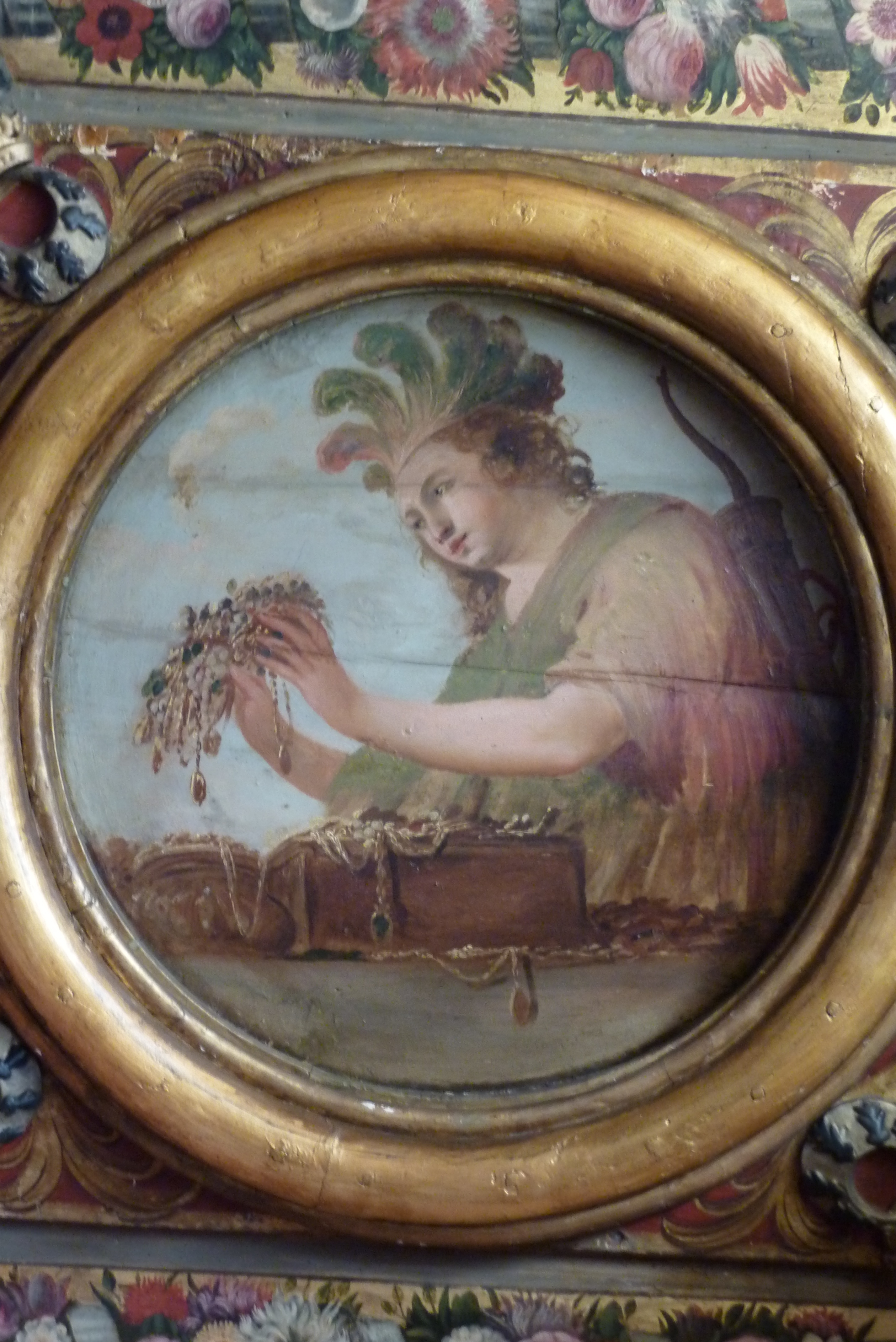 Bibliothèque de l'Arsenal (1 rue de Sully im 4. arrondissement von Paris): ehemalige Wohnräume